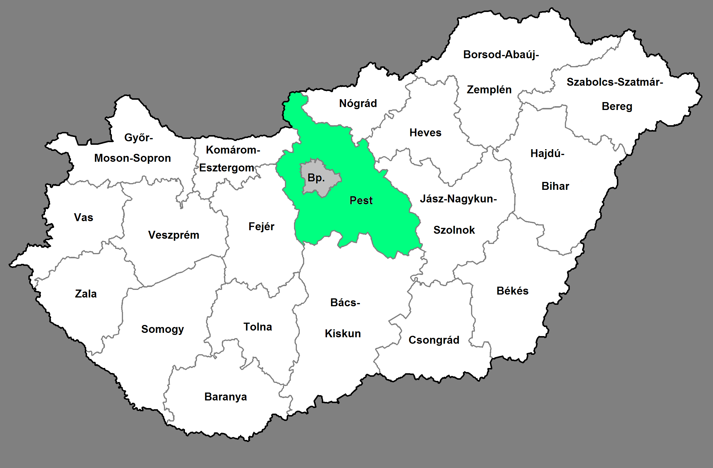 HU MAP (Az Észak-Alföldi régió kistérségei, 2007.)